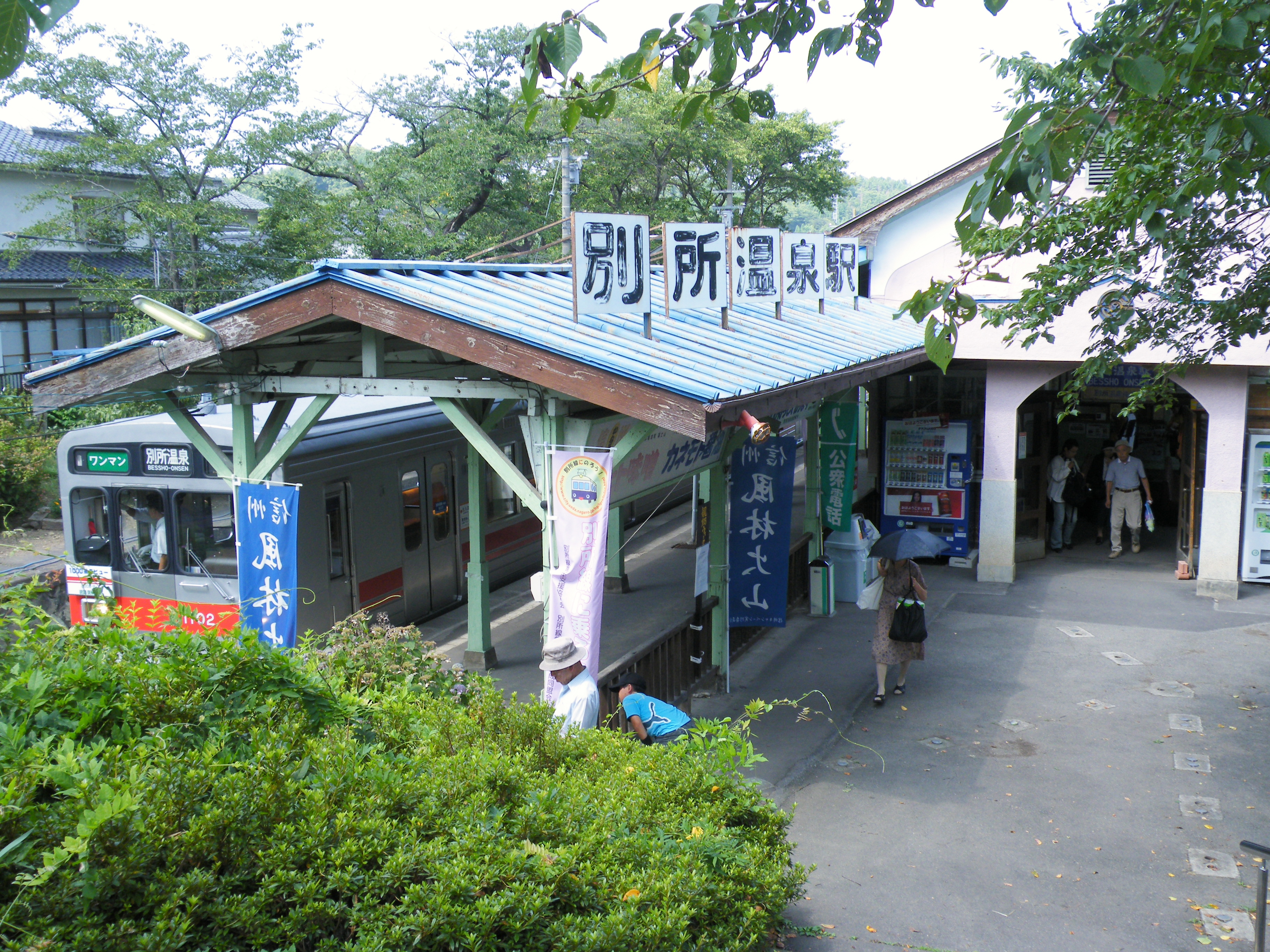 上田電鉄別所温泉駅